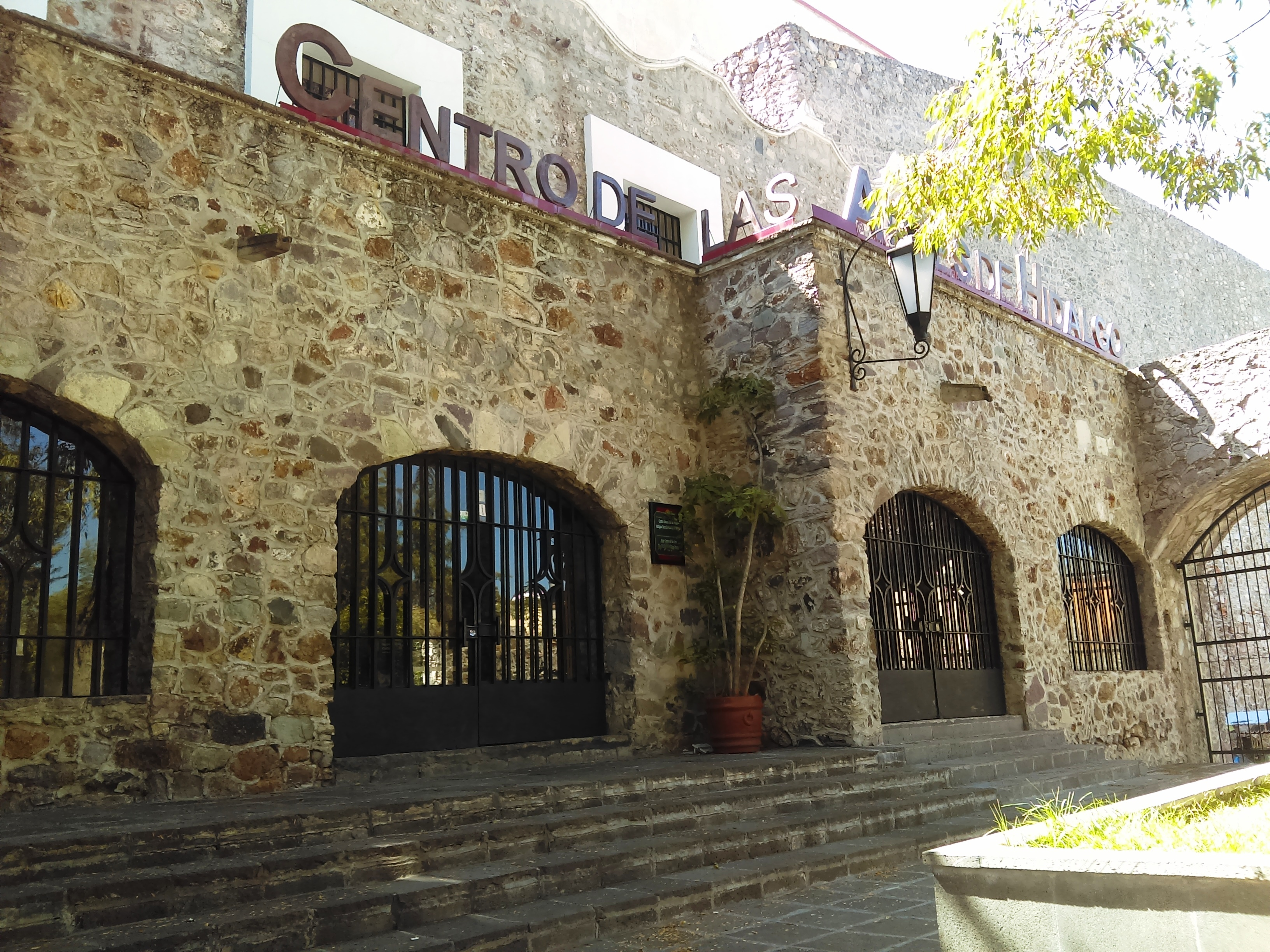 Exconvento de San Francisco en Pachuca, México.